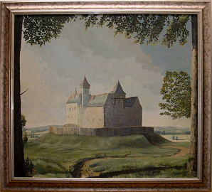 Hrad Vrškamýk, olej na plátně 79x70 cm